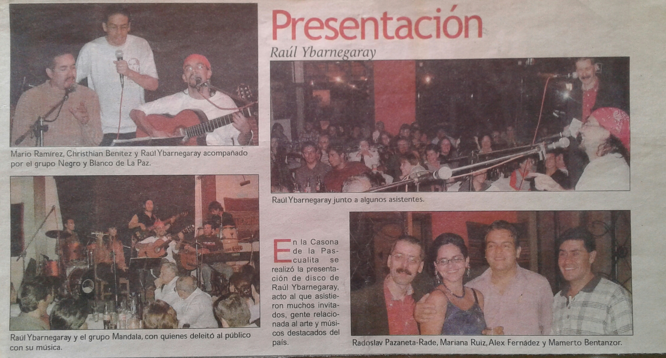 Publicación de prensa sobre la presentación del primer disco en la Casona de la Pascualita.